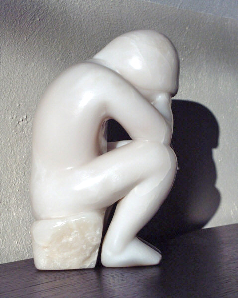 Der Denkende: Specksteinskulptur von Ruth Kopp Künstler: Ruth Kopp, Wegberg, Erlaubnis zur Veröffentlichung liegt vor Erstellt: 11/2000